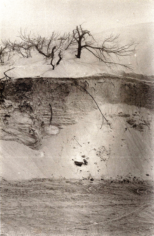 Dégradation des dunes de la Macta. Près de Mers-El-Hadjadj, la végétation dunaire est fortement dégradée. Une partie du sable de la dune a été emporté (traces de véhicule au pied de la dune). Photo prise en 1983.